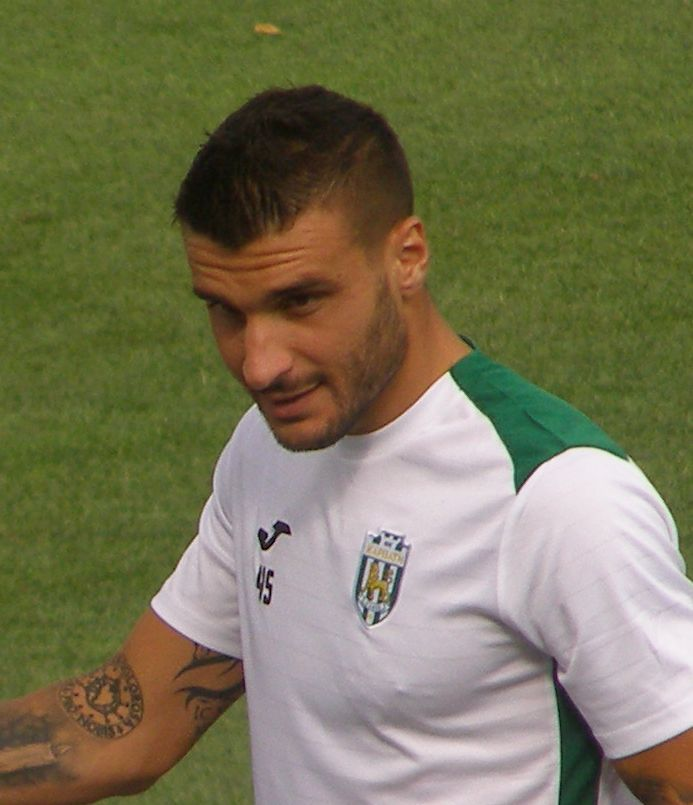 Себастьян Рібас під час представлення команди "Карпати" (Львів) перед сезоном 2017/18. Зустріч з уболівальниками